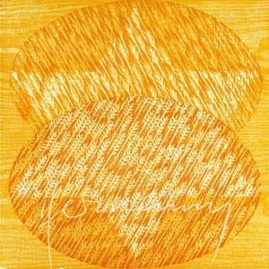 Gerhard Hermanns, Farbholzschnitt, Titel: Gaia VI Die Farbe des Korns